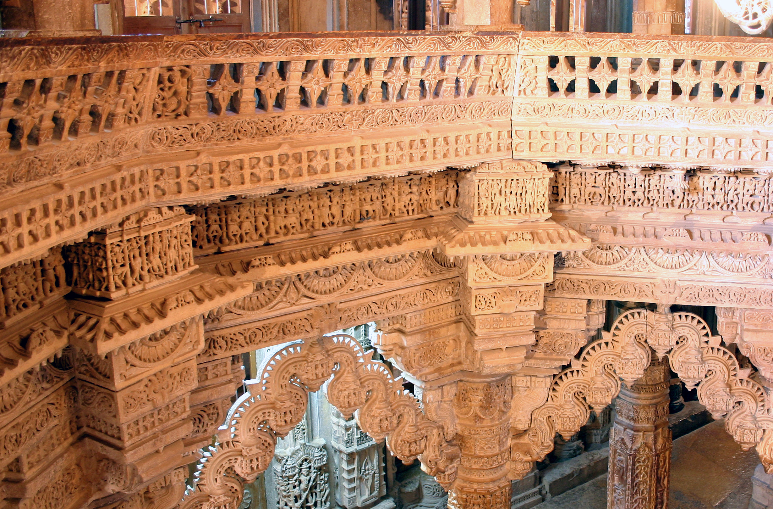 Mit reichhaltigen Steinschnitzereien geschmückte Brüstung in einem Jain Tempel in Jaisalmer